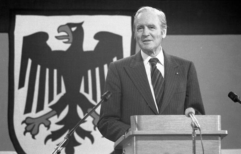 Bundespräsident Karl Carstens besucht Bundesnachrichtendienst in Pullach